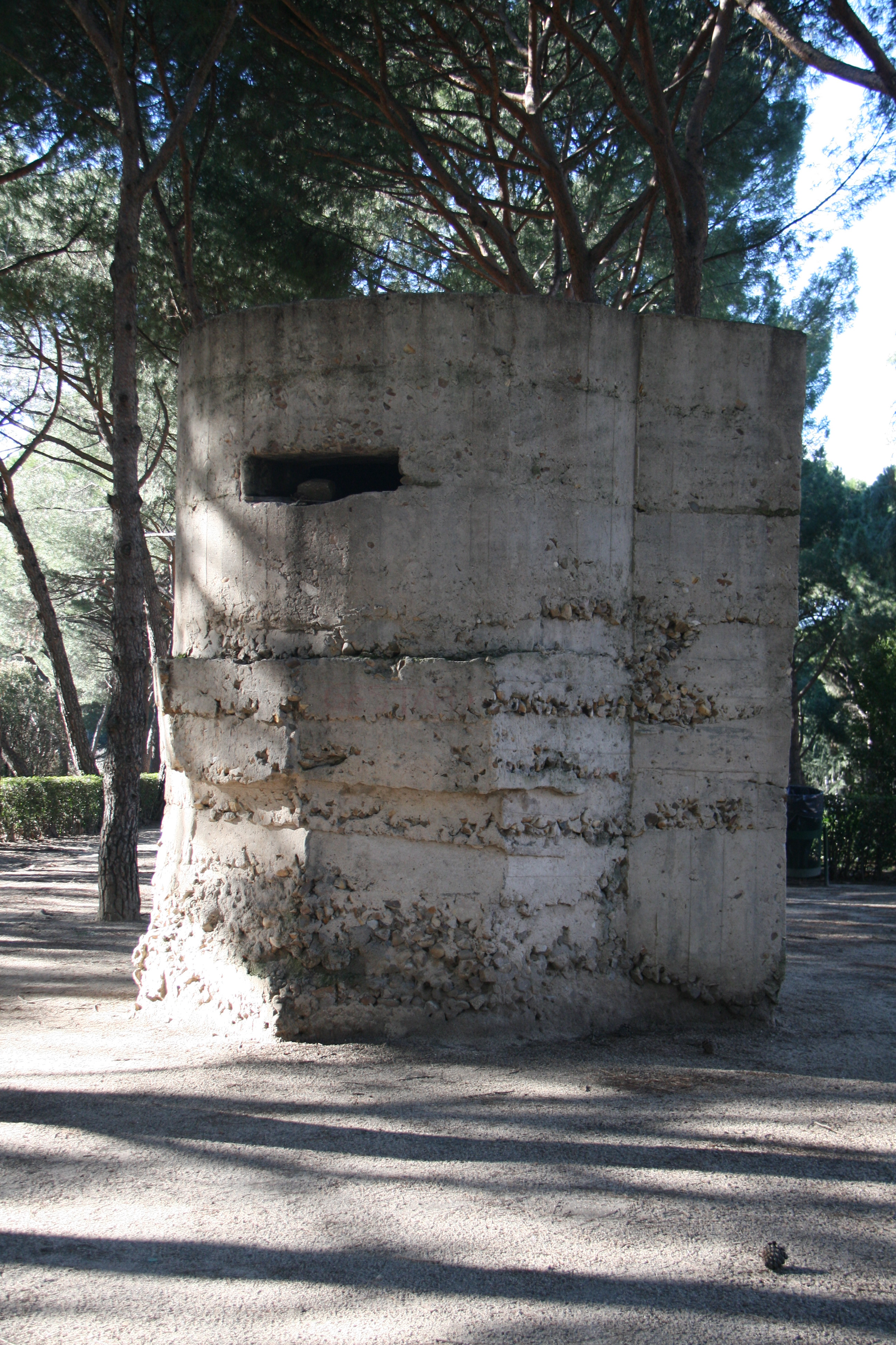 Bunker en Parque del Oeste